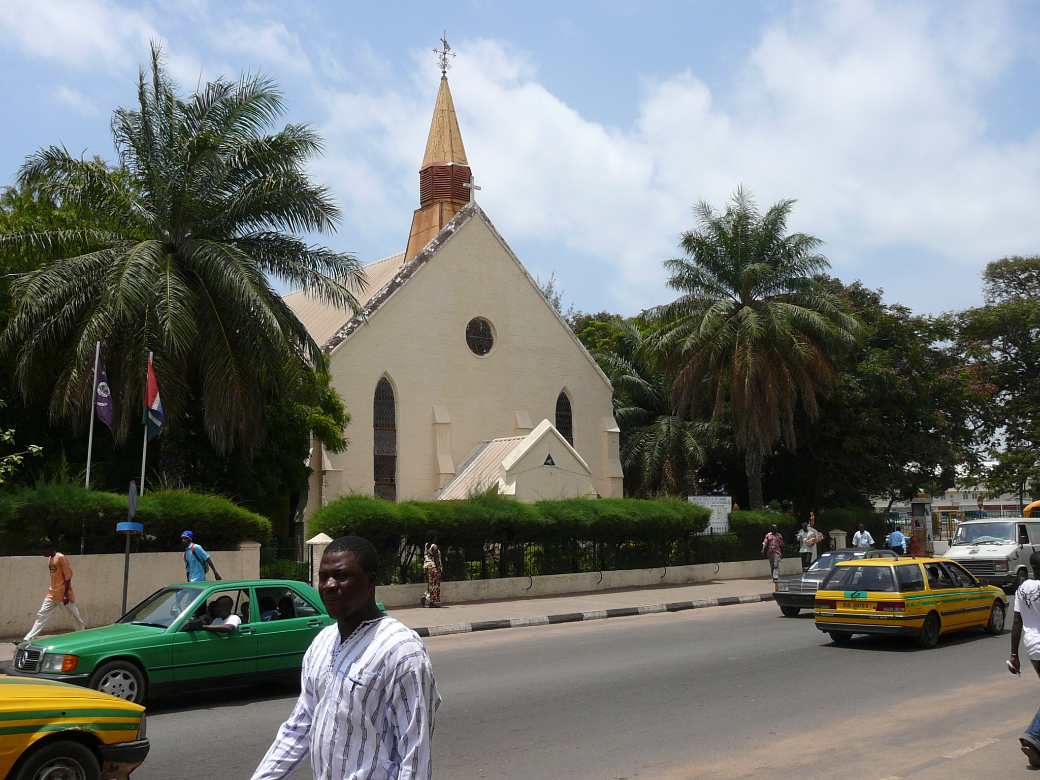 Straße in Banjul; Anglikanische Kathedrale von Banjul